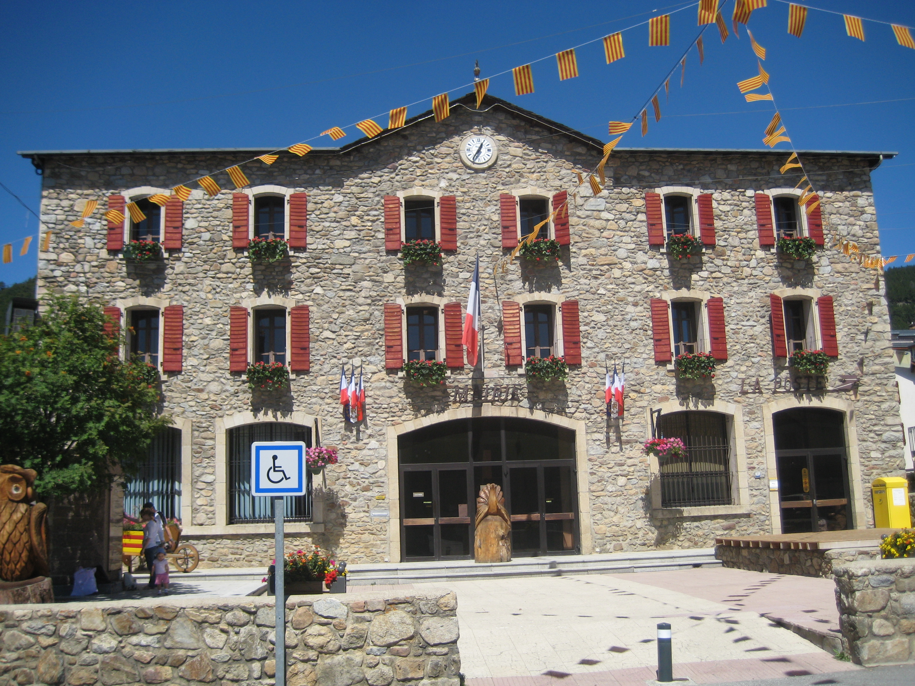 Mairie des Angles